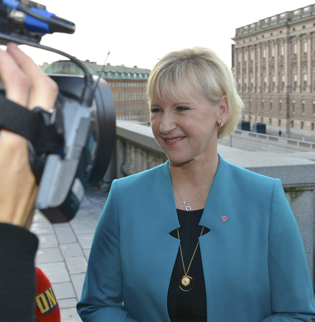 Margot Wallström som nyutnämnt statsråd den 3 oktober 2014.